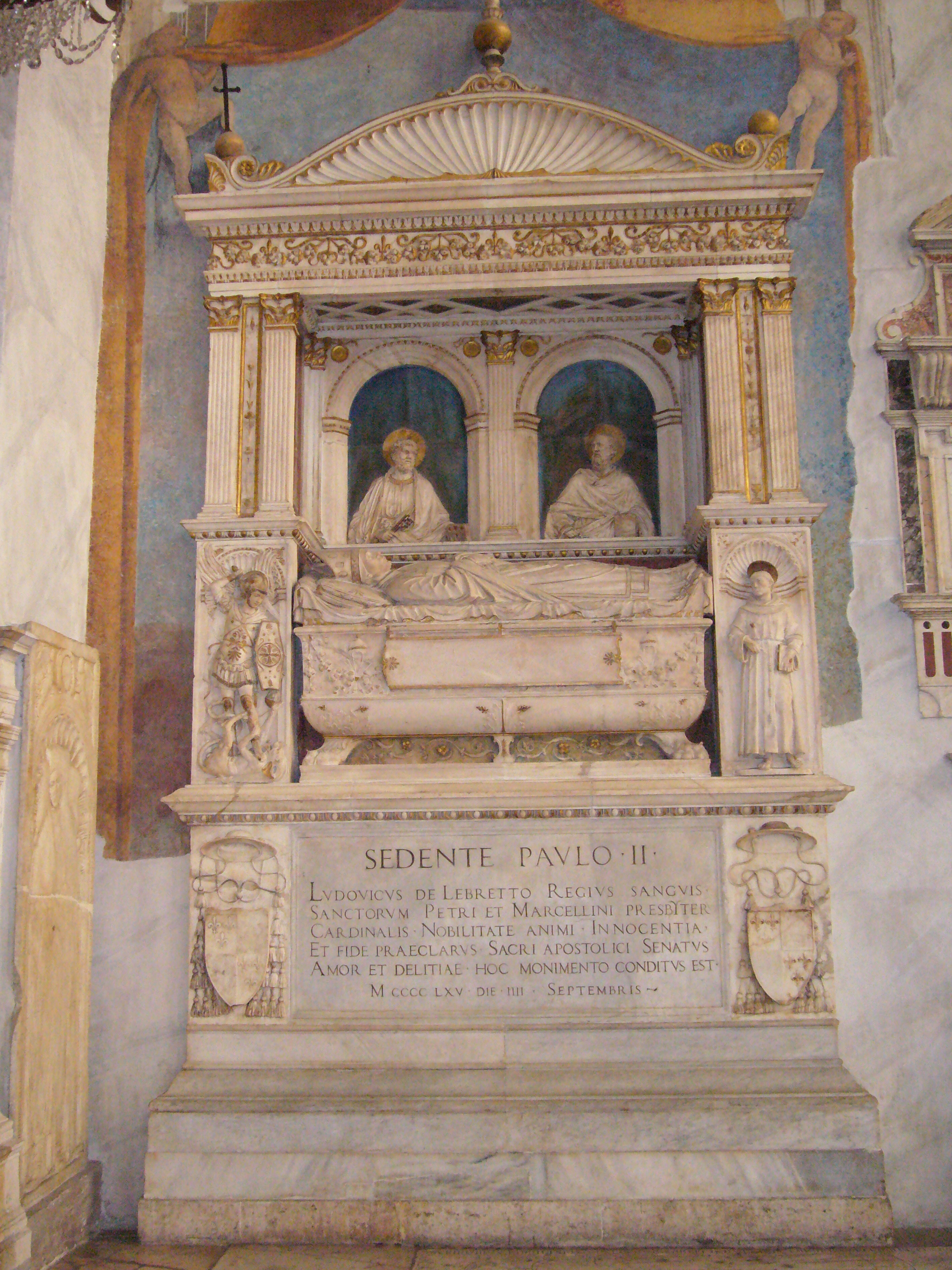 Roma, santa Maria in Aracoeli, sepolcro del cardinale Ludovico d'Albret (Andrea Bregno)